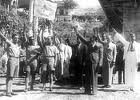 הצדעה במועל יד על ידי הפלנגות הנוצריות